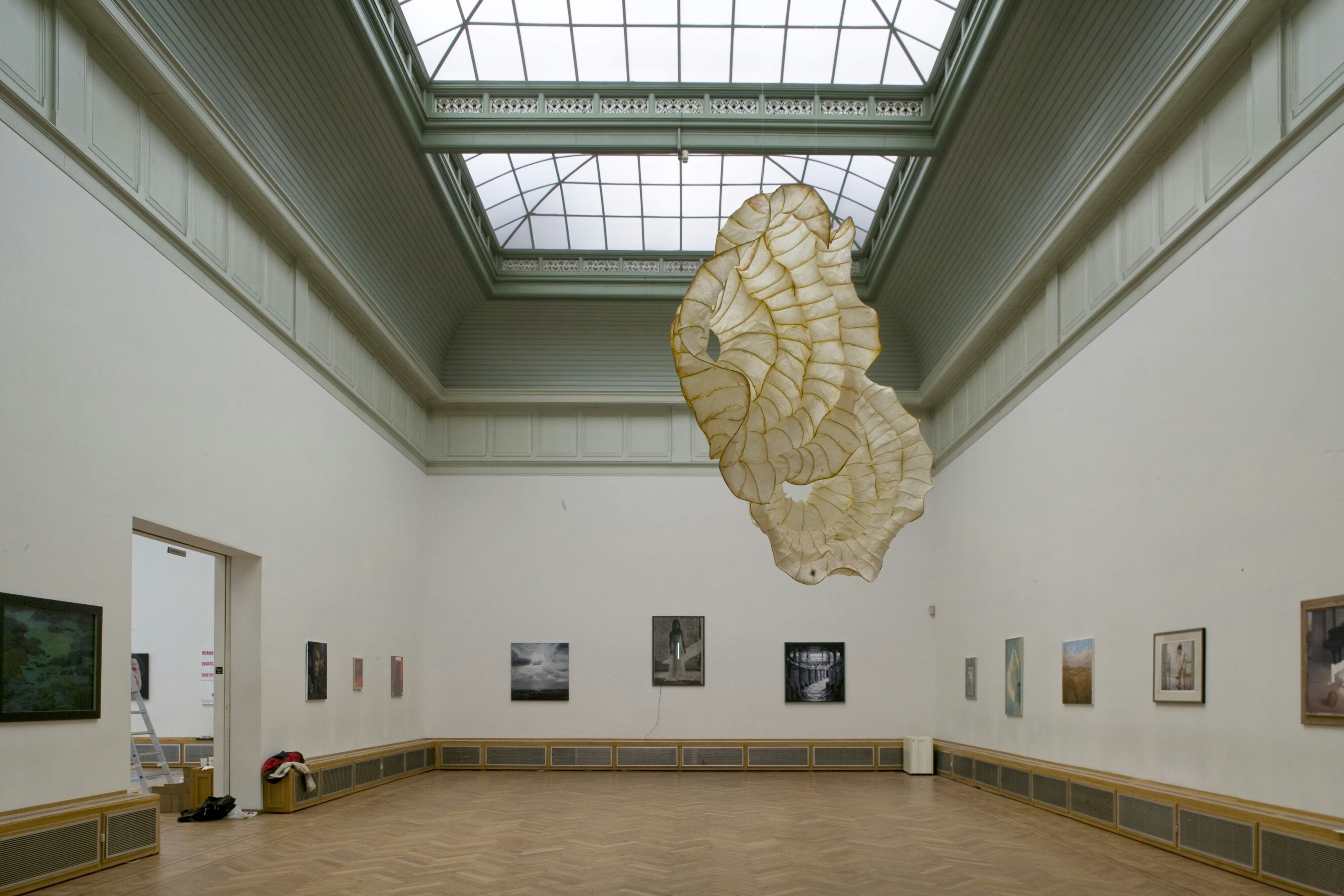 Pulchri Studio: Interieur, overzicht van de antichambrezaal met kunstexpositie